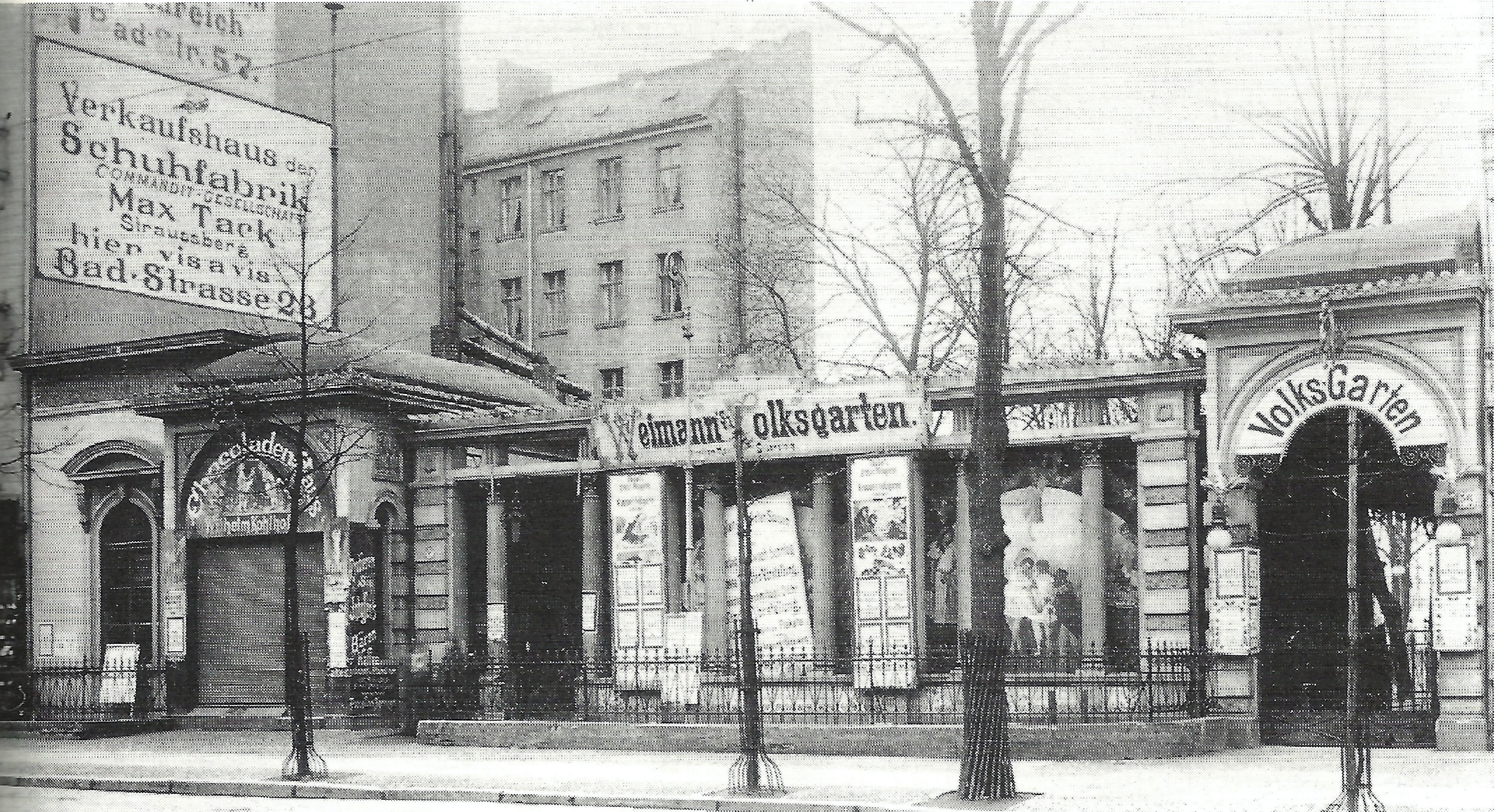 Berlin-Gesundbrunnen Weimanns Volksgarten 1905 vor dem Abriss